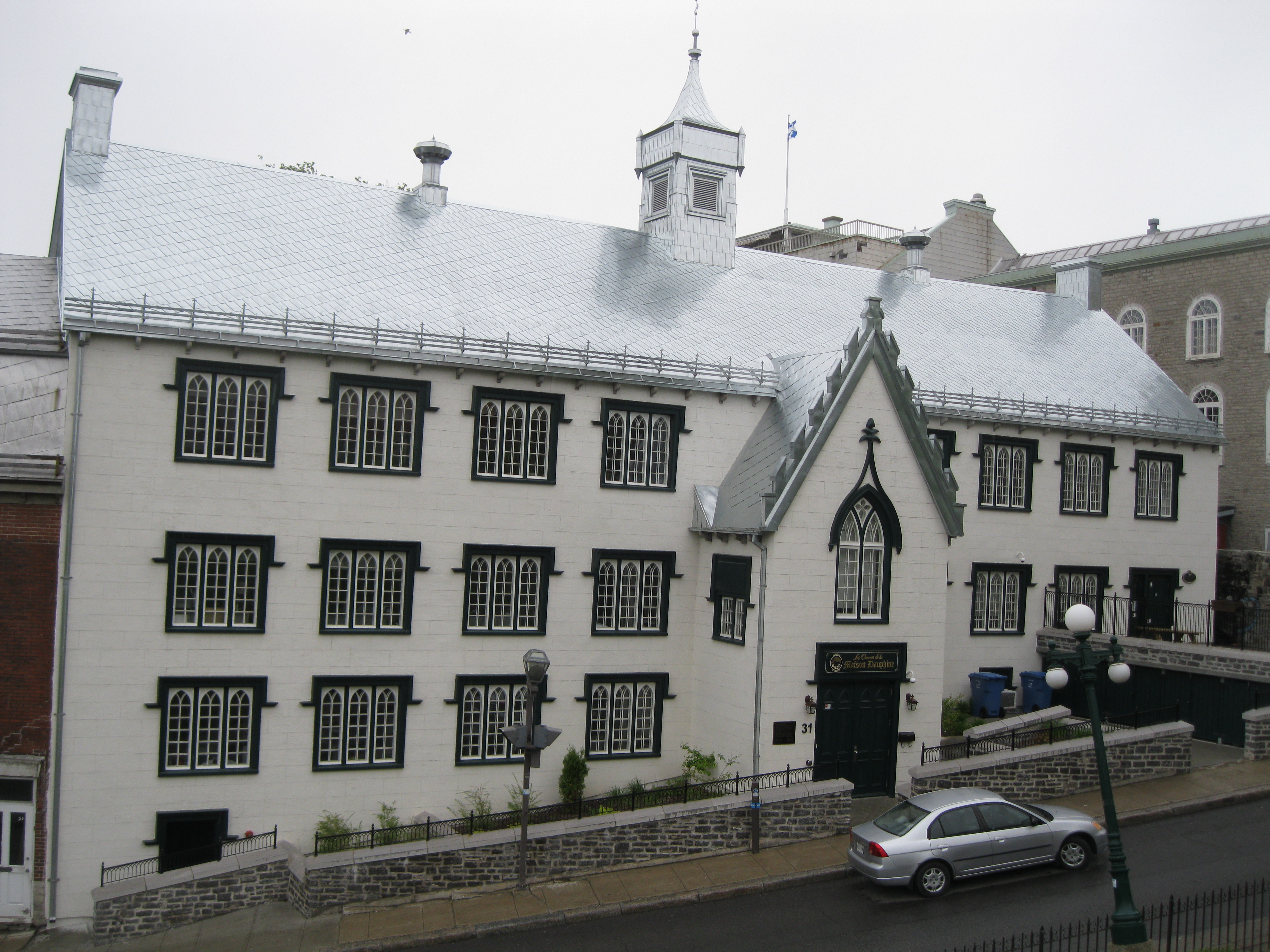 Édifice de la National School, 29 à 35, rue d'Auteuil, Québec. Il héberge depuis le 8 janvier 2012, les Œuvres de la Maison Dauphine.